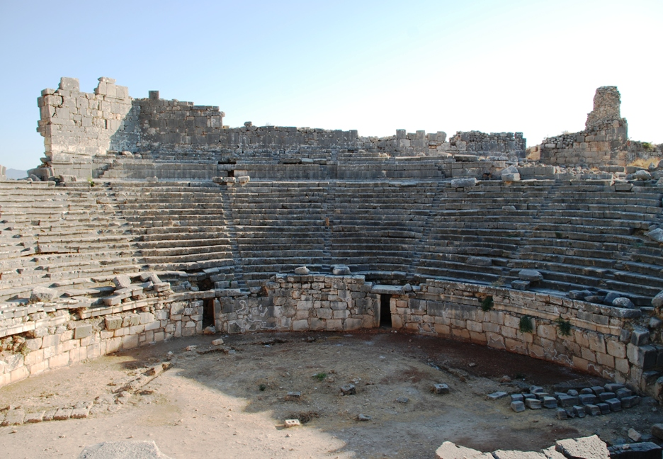 Theater in Xanthos